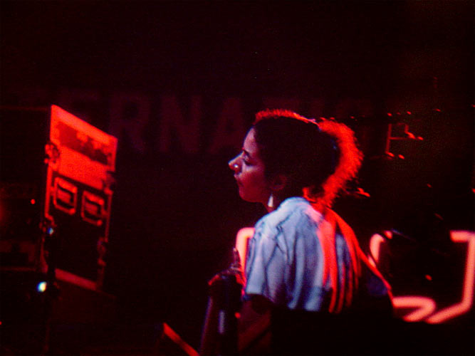 Marilyn Mazur, Pompei Jazz Festival 1987